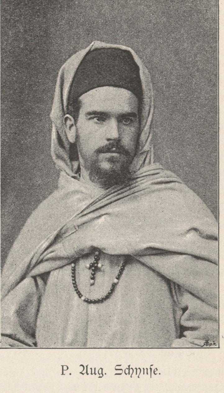 Pater August Schynse, früher Afrikamissionar